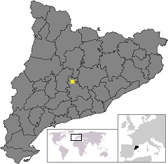 Localització de Calaf. Location of Calaf in Catalonia.